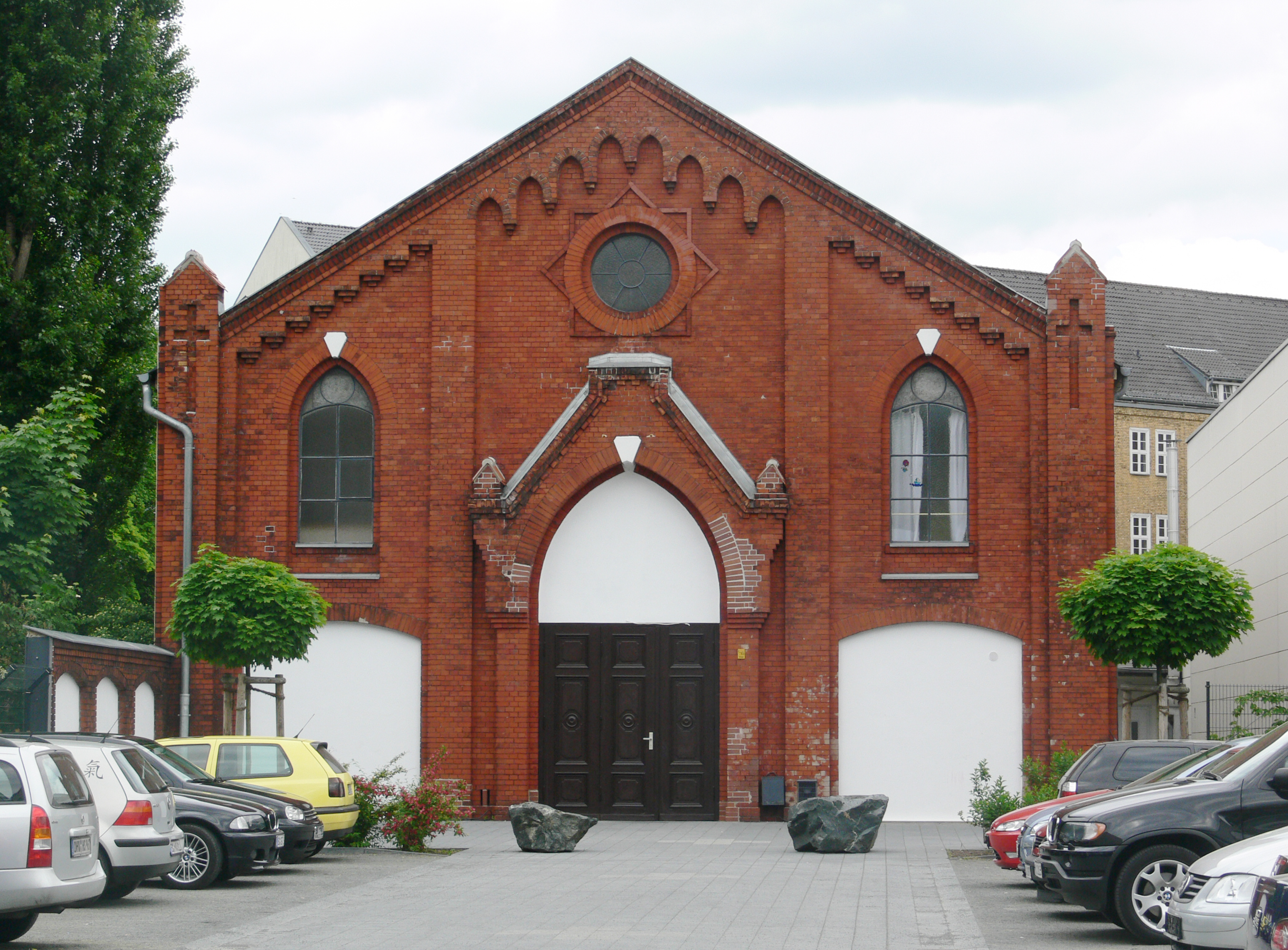 Baptistenkirche Wedding (Evangelisch-freikirchliche Gemeinde Berlin), Müllerstraße 14a, Berlin